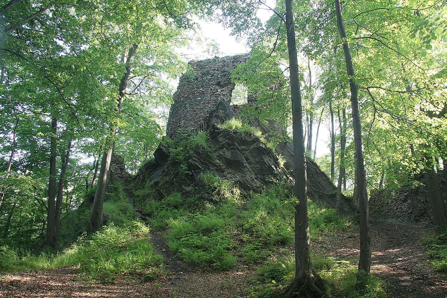 Čtyřhranná věž hradu Hamrštejn